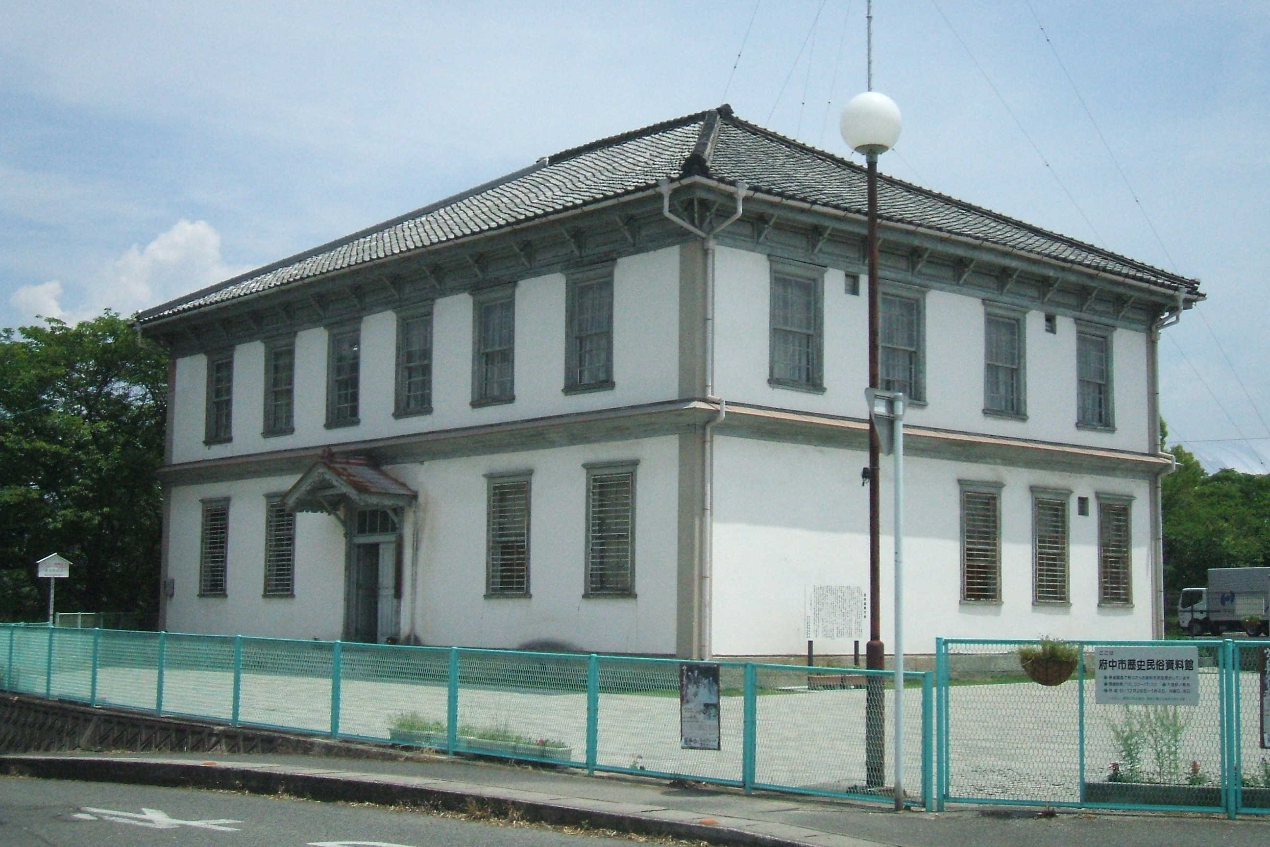 広島県府中市にある府中市歴史民俗資料館として使われているかつて芦品郡役所庁舎として使われていた建物